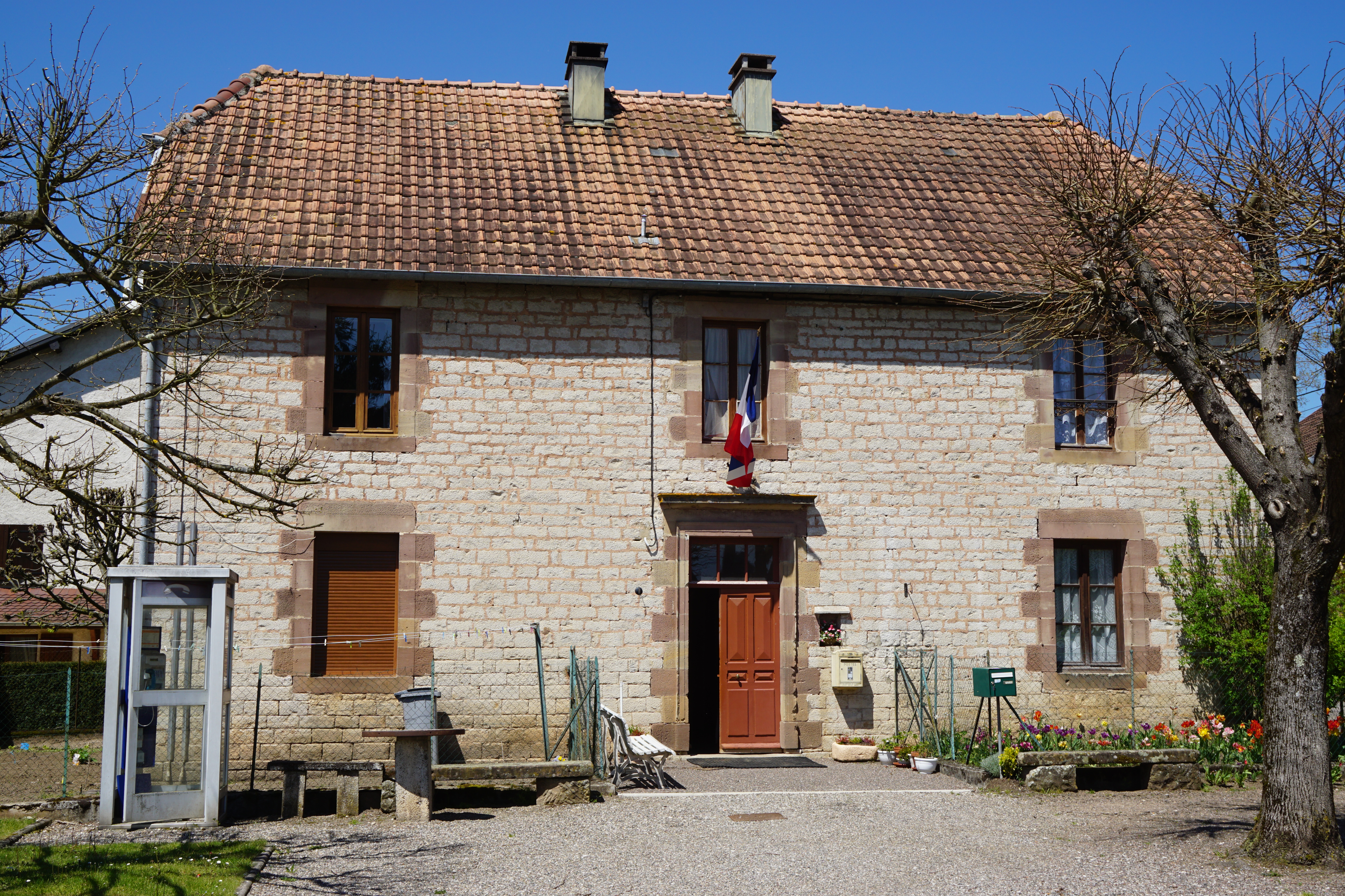 Mairie de Saint-Sulpice (Haute-Saône).